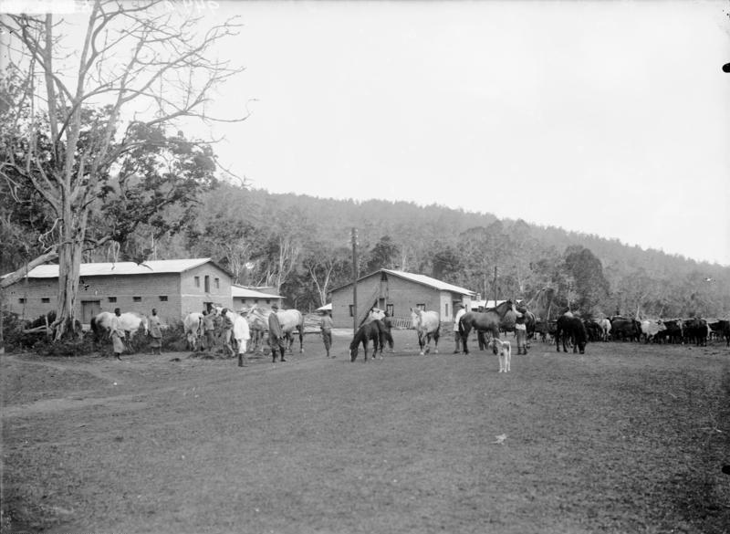 Auf Neu-Hornow